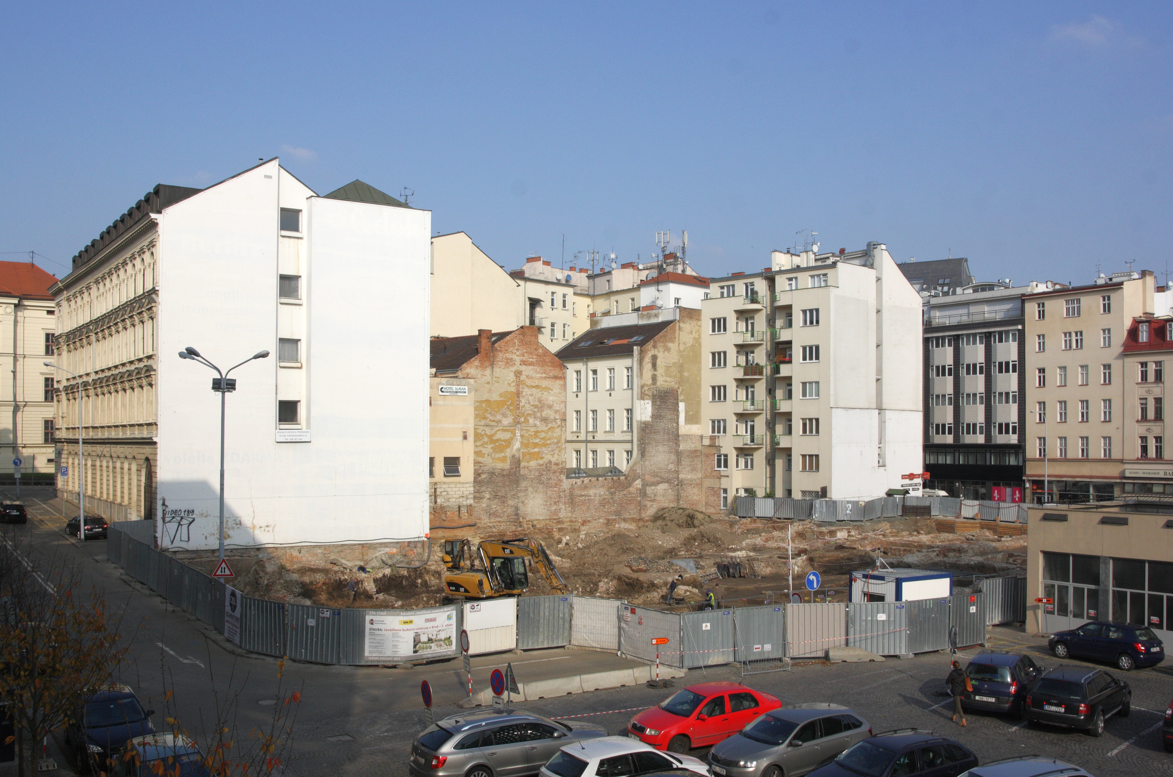 Brno, ul. Besední - staveniště podzemního parkoviště.